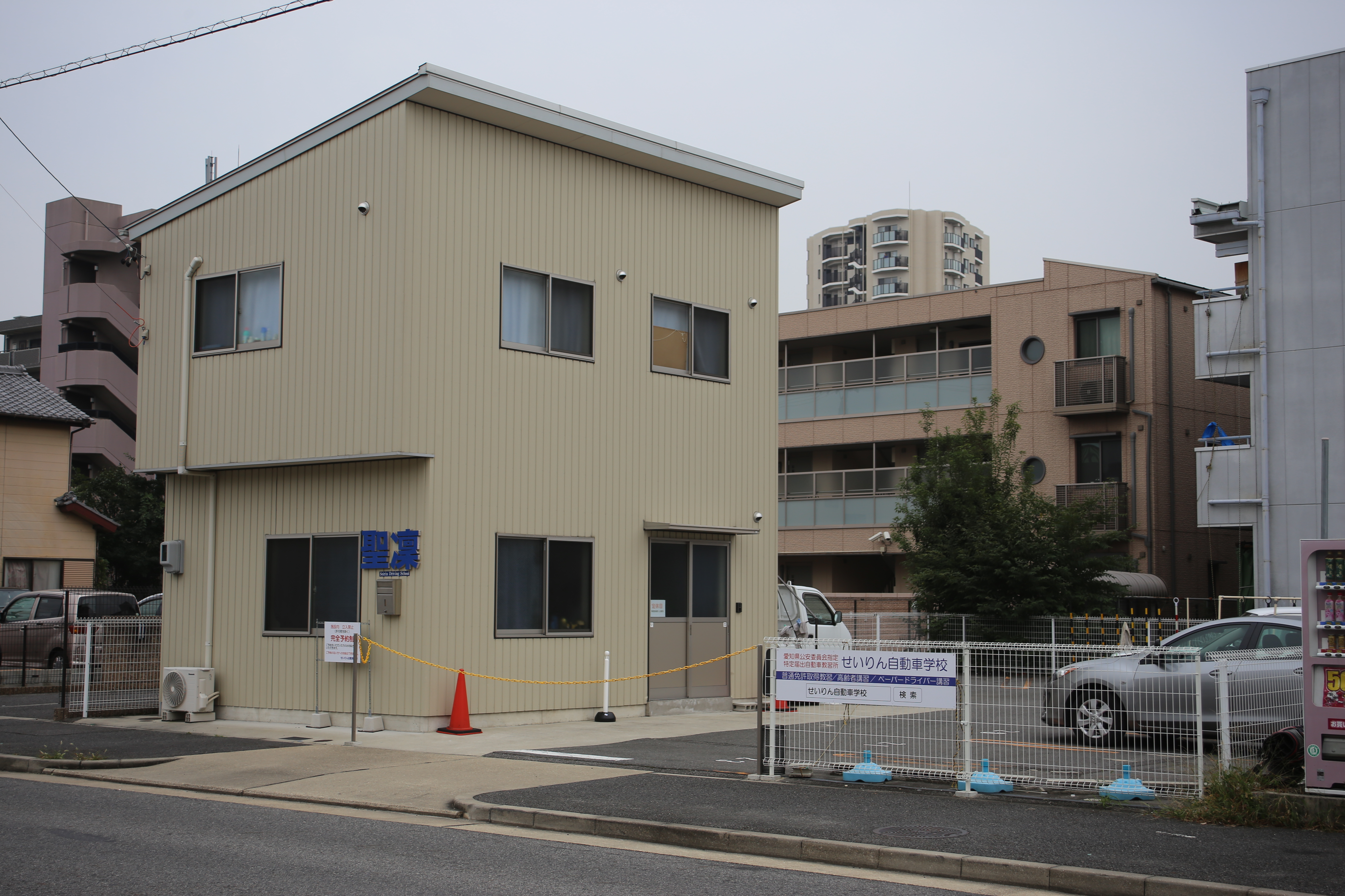 名古屋市東区筒井三丁目のせいりん自動車学校を北側公道西側より撮影